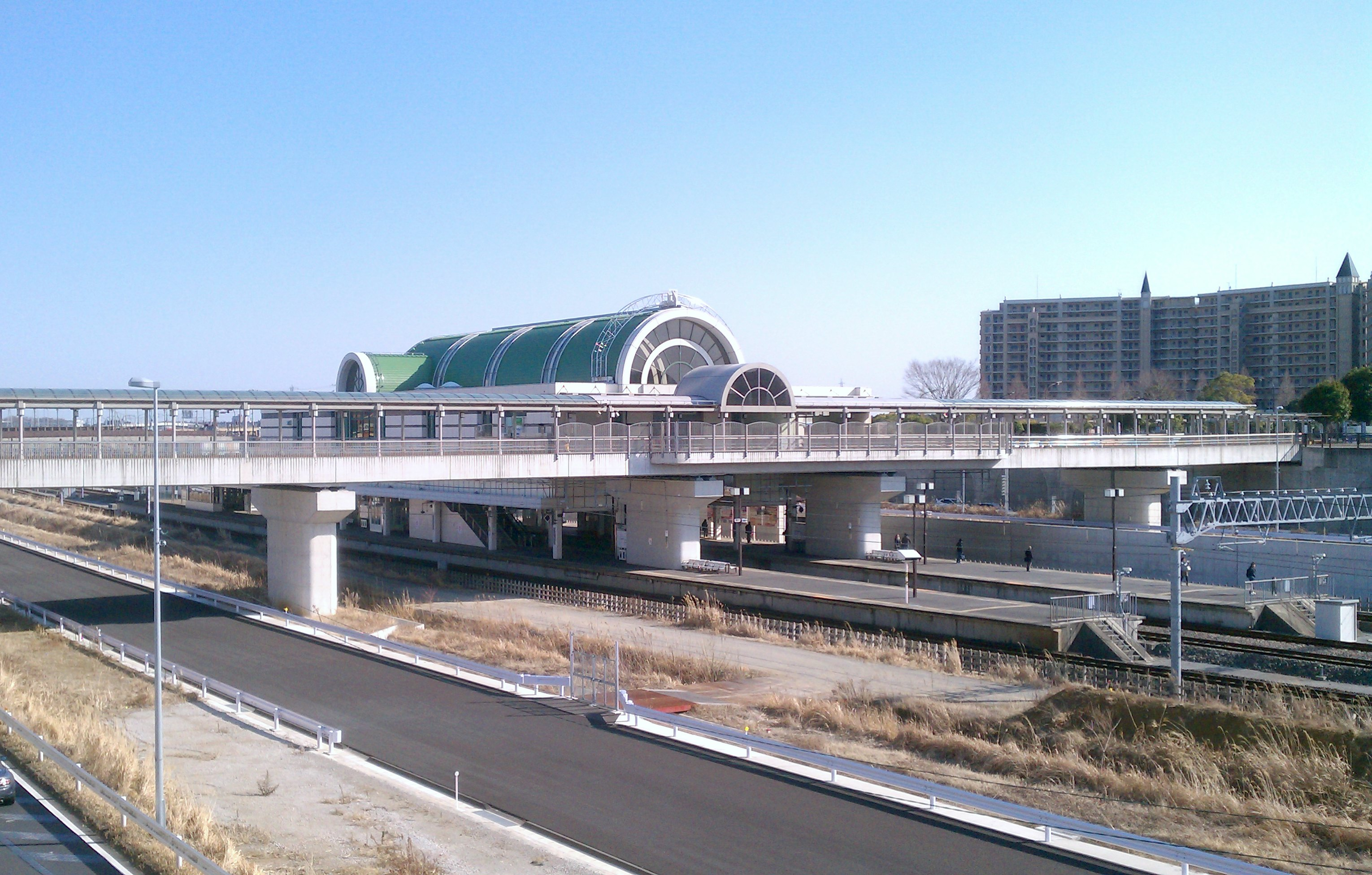 北総線 印西牧の原駅 駅舎 （2013年2月撮影）